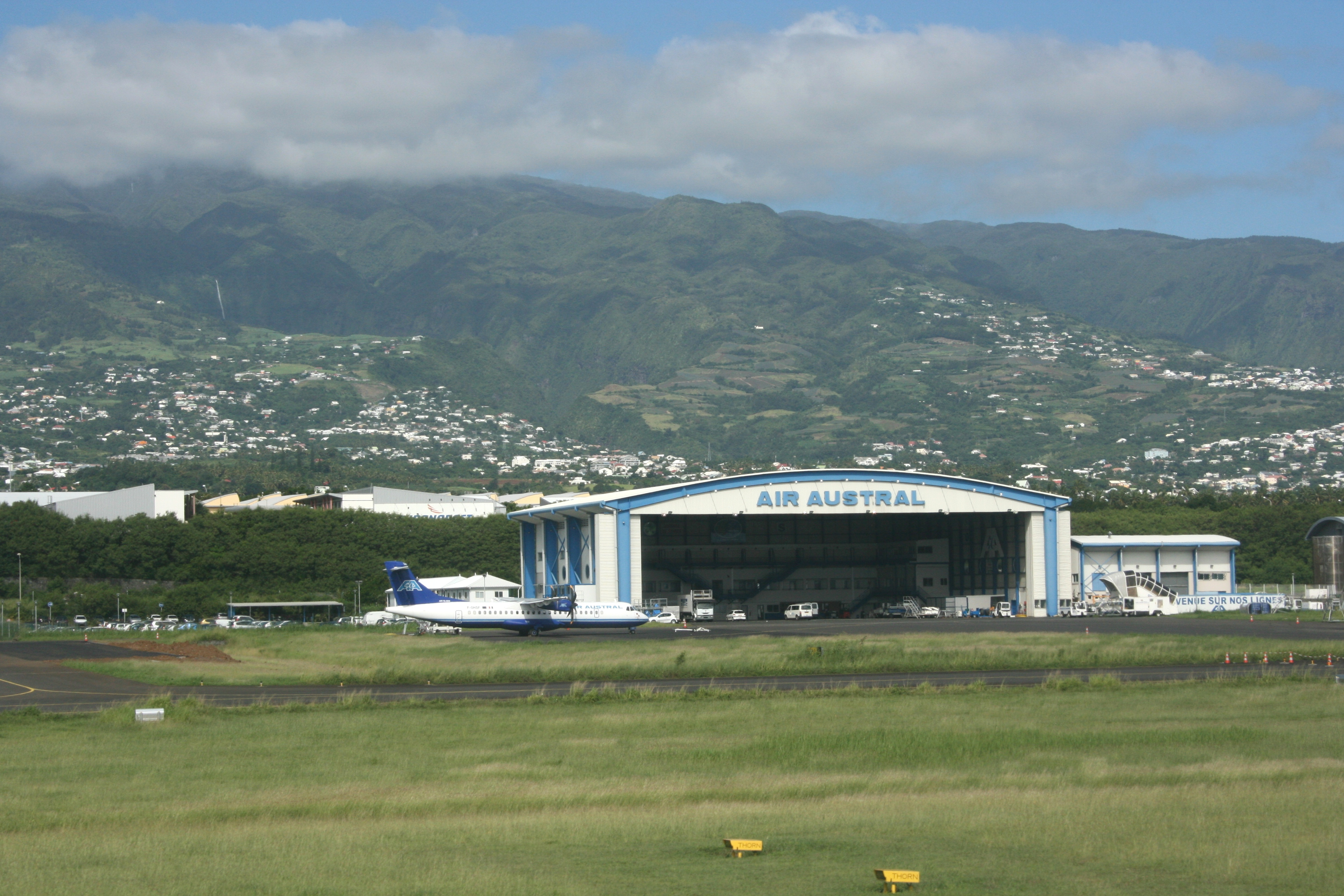 Avion d'Air Austral à l'aéroport de La Réunion Roland-Garros.